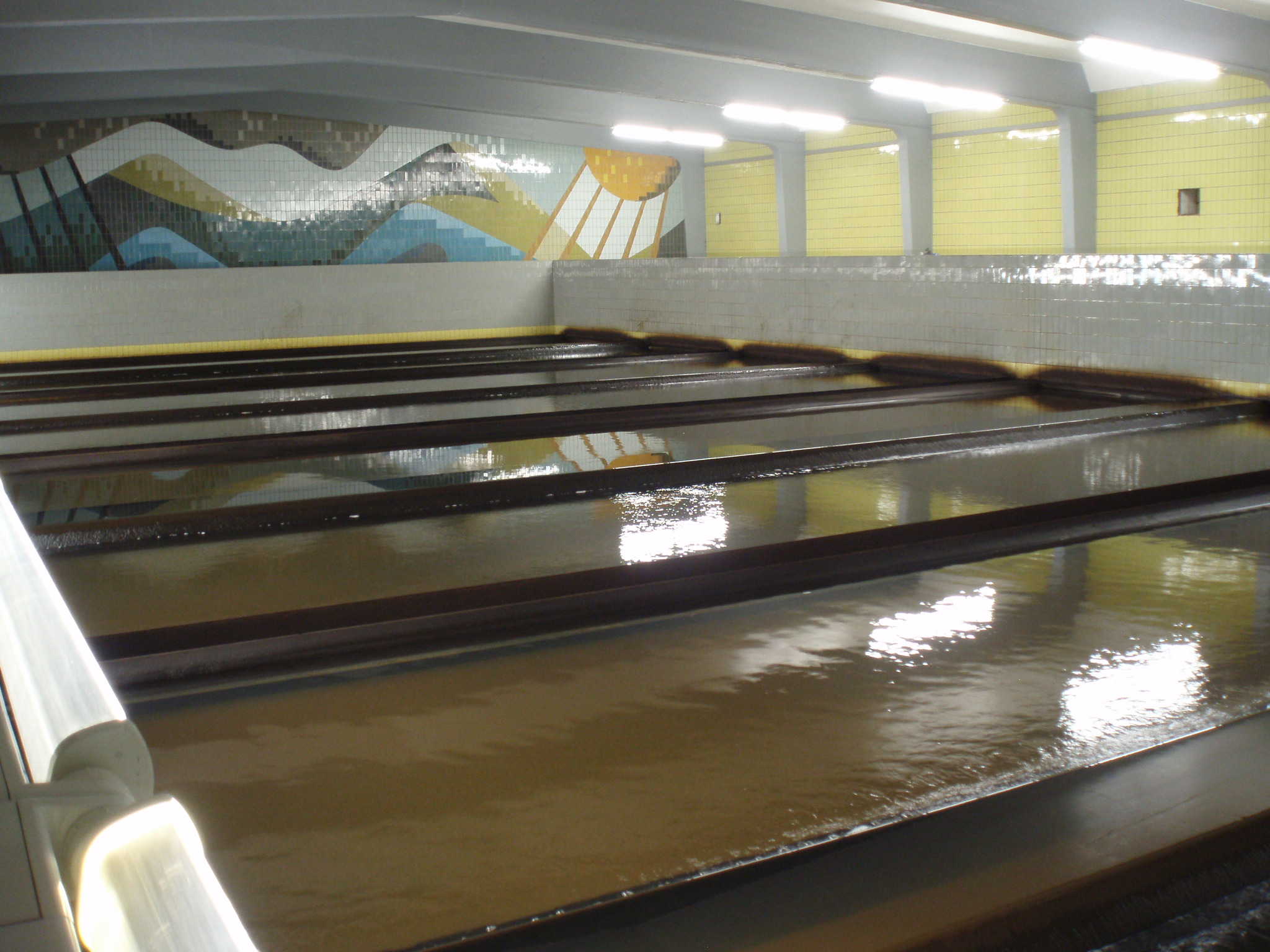 Wasserwerk Fuhrberg, Filterhalle am 2009-09-13